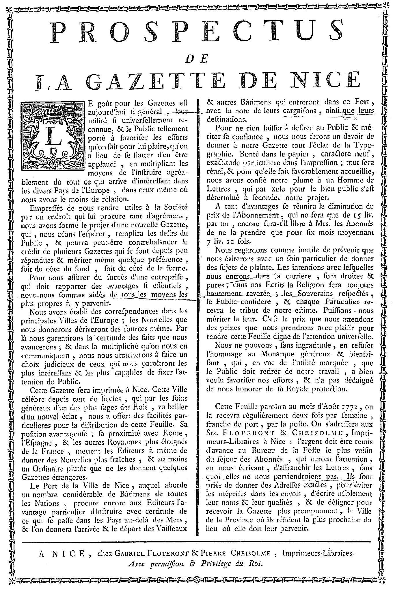 Prospectus de la Gazette de Nice, à paraître en août 1772, publiée par Gabriel Floteront et Pierre Cheisholme.